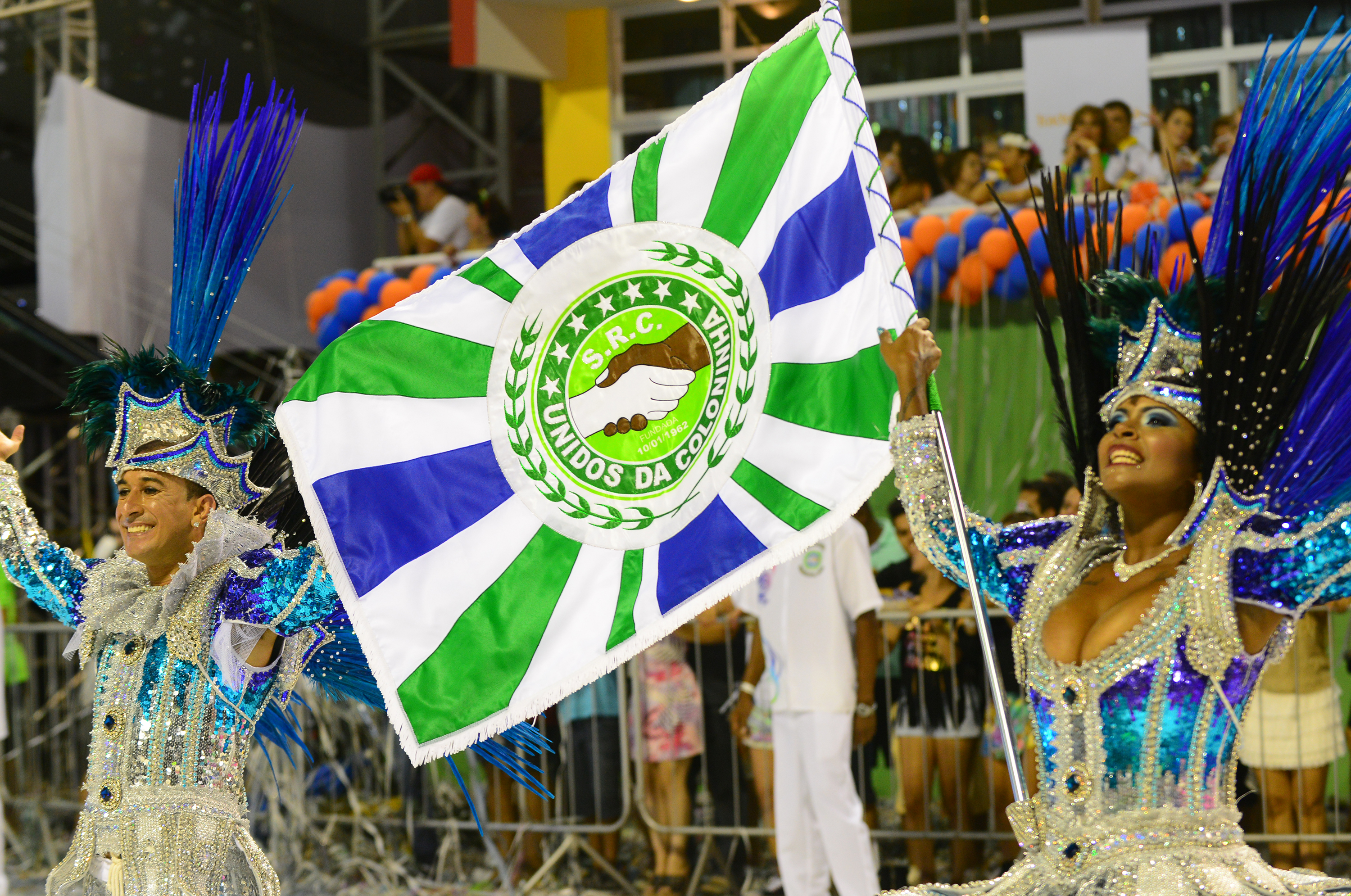 Mestre-sala e porta-bandeira da S.R.C. Unidos da Coloninha em 2014. A escola foi a vice-campeã.